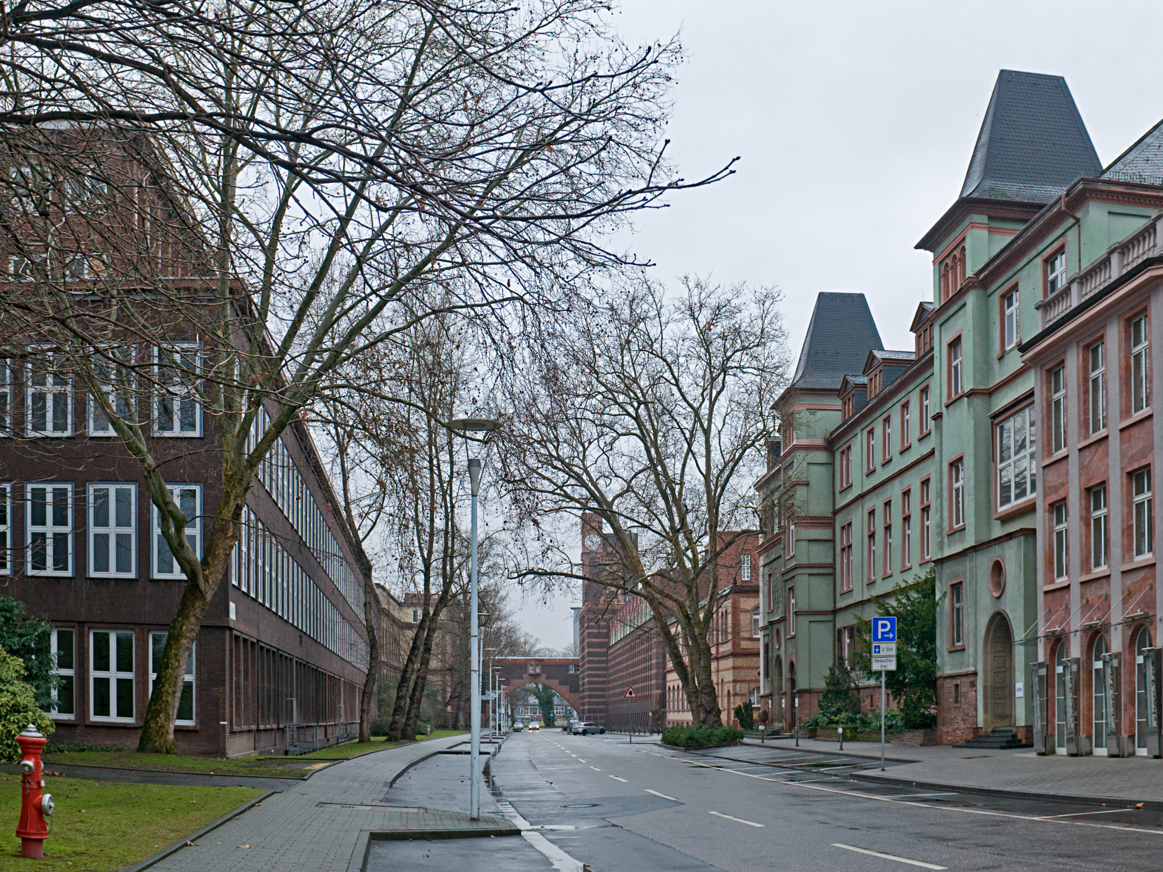 Industriepark Höchst Blick von Osten in die Brüningstraße, im Hintergrund der Behrensbaus mit Brücke und Turm